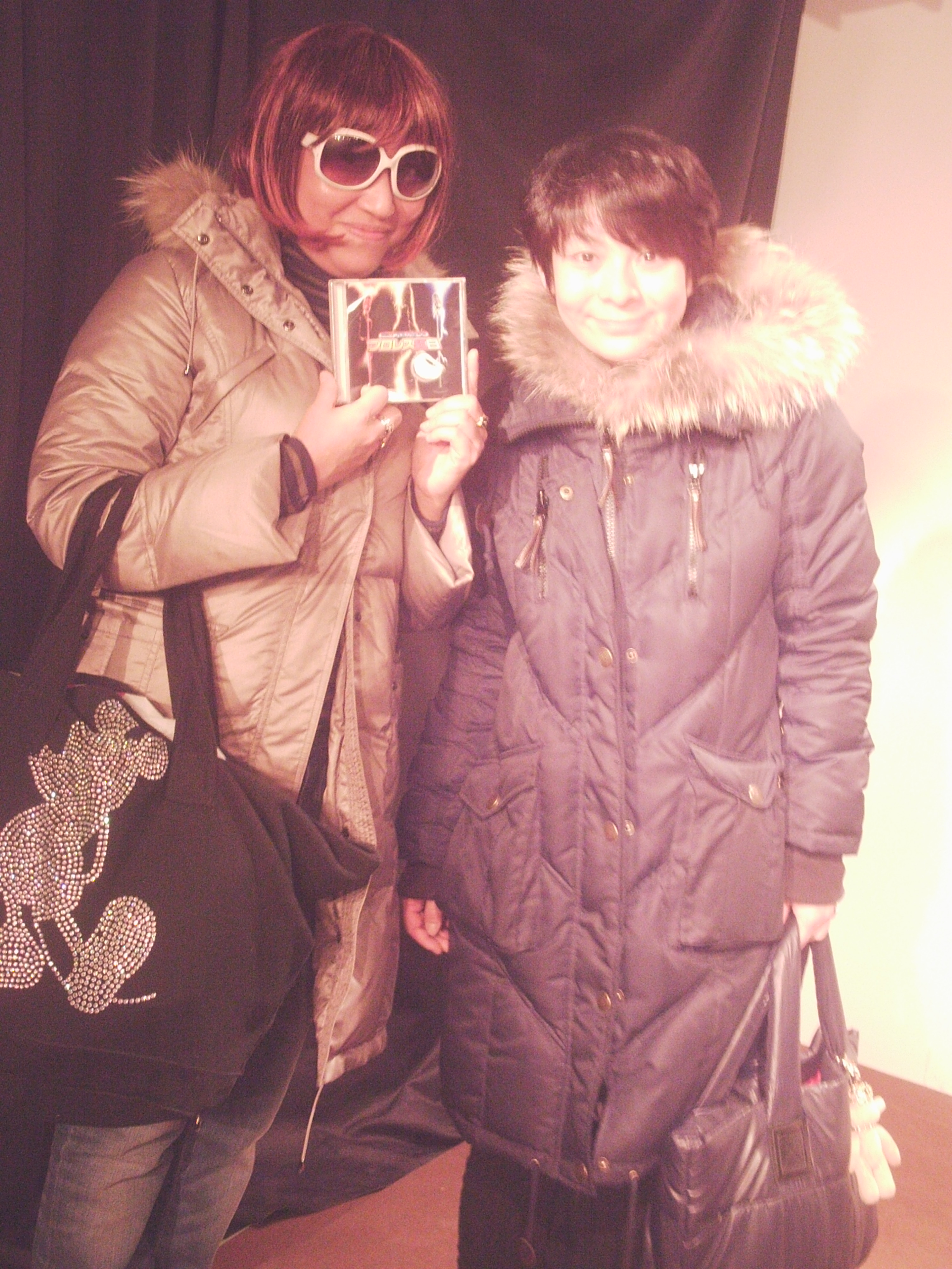 おーばんず (2010年2月)